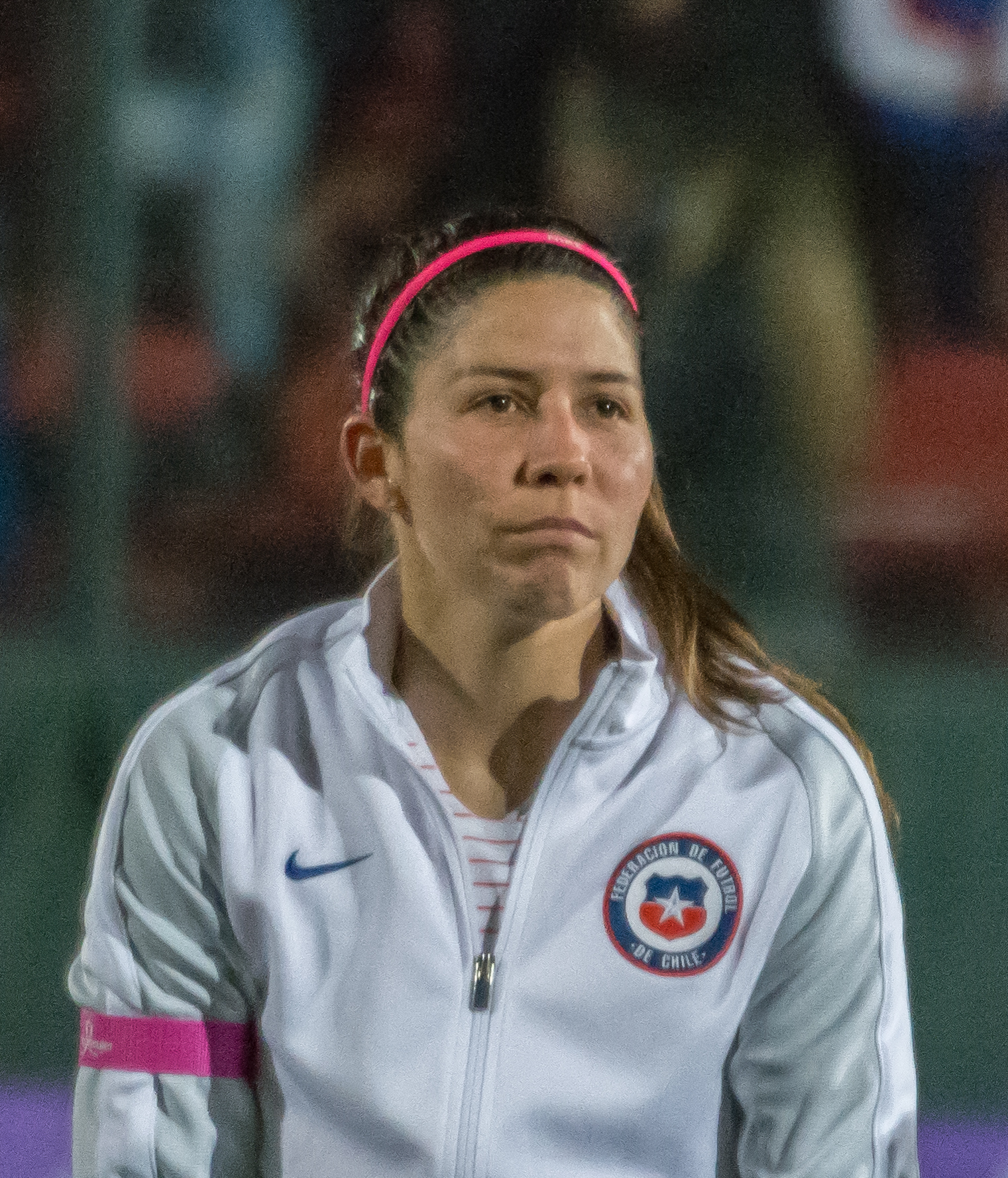 Carla Guerrero, Chile v Sudáfrica, Estadio Santa Laura, Independencia, Santiago, Chile.